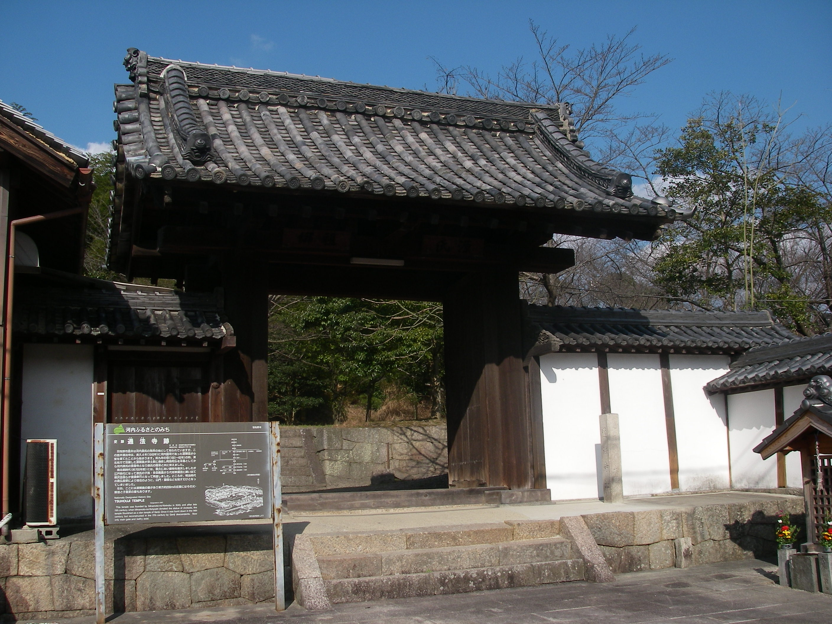 通法寺跡(大阪府羽曳野市) Tsuhoji, Habikino, Osaka, Japan 2007年1月29日撮影 撮影機材:PENTAX Optio W10 撮影者:Maechan0360